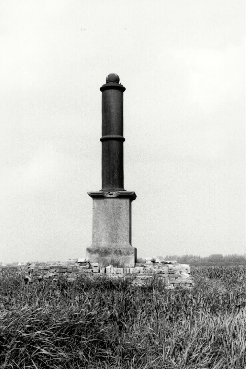 De ijzeren paal langs de Polderdijk is het geodetisch signaal van Zandvoorde, dat deel uitmaakt van een midden-19de-eeuws geodetisch net, meer bepaald een driehoeksnet waarvan de hoeken waren gemeten en waarvan de schaal werd bepaald door de opmeting van drie basissen in België, nl. Oostende, Lommel en Hamipré. In Oostende was de basis gelegen langs de Torhoutsesteenweg, nabij de "Hooge Barriere" (Stene). Voor de ontwikkeling van deze basis werd enerzijds een toren in Raversijde gebruikt en anderzijds het ijzeren merkteken langs de Polderdijk in Oostende. De merktekens langs de Torhoutsesteenweg en in Raversijde zijn verloren gegaan door de verbreding van de steenweg en de uitbreiding van de Oostendse luchthaven; de paal in Zandvoorde is nog steeds een merkteken in het vlakke, gaaf bewaarde polderlandschap in Zandvoorde. Het werd in 1853 opgericht en is op een stafkaart van het Militair Cartografisch Instituut van 1861 aangeduid als "Signal Géodésique".